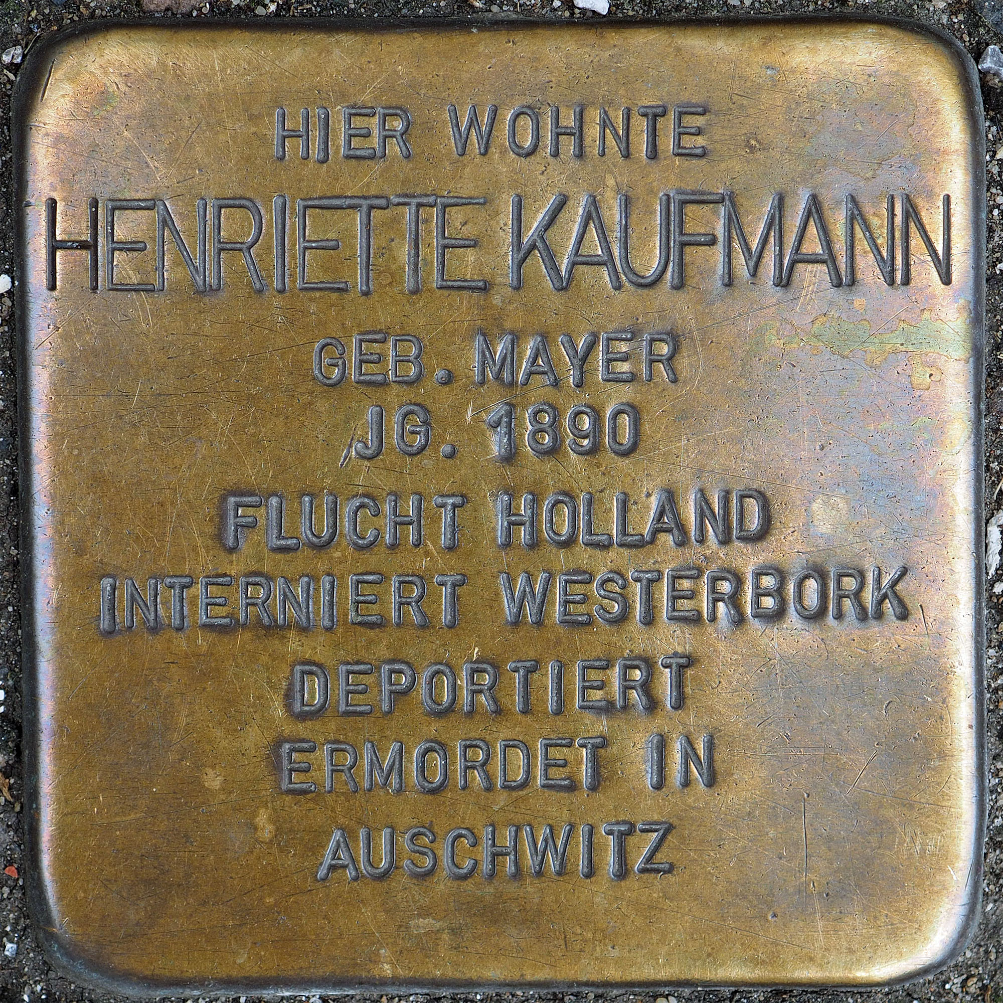 Stolperstein Geldern Hartstraße 2 Henriette Kaufmann